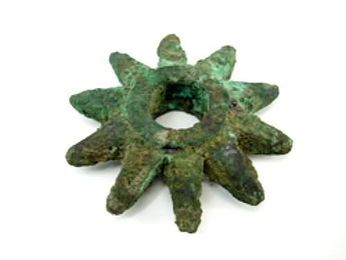 Bronce